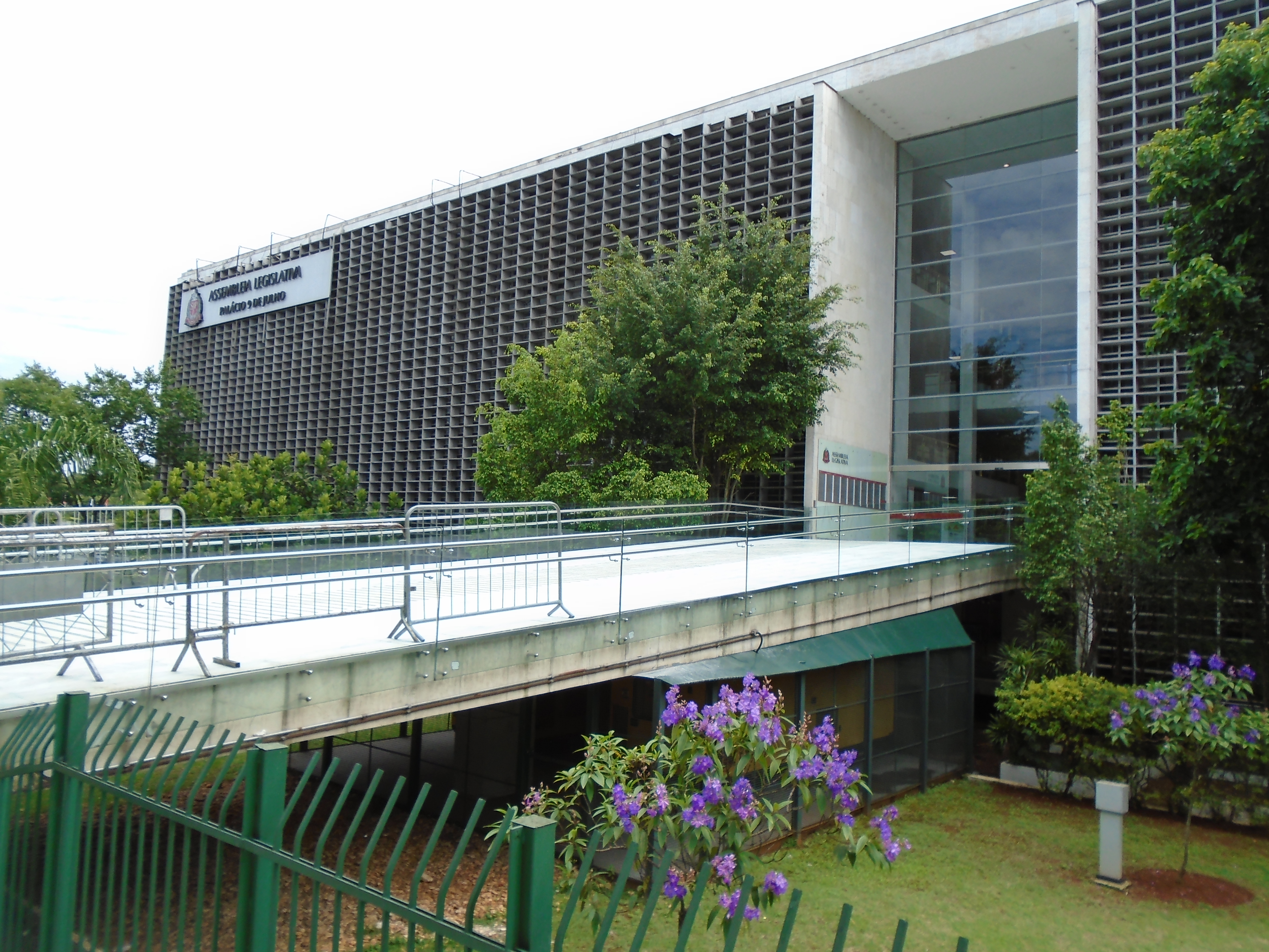 Assembléia Legislativa de São Paulo